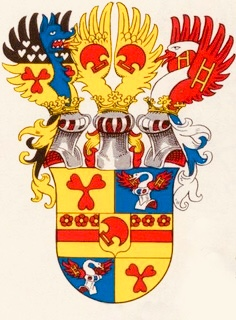 Armoiries de la famille Franckenstein, 17. siècle